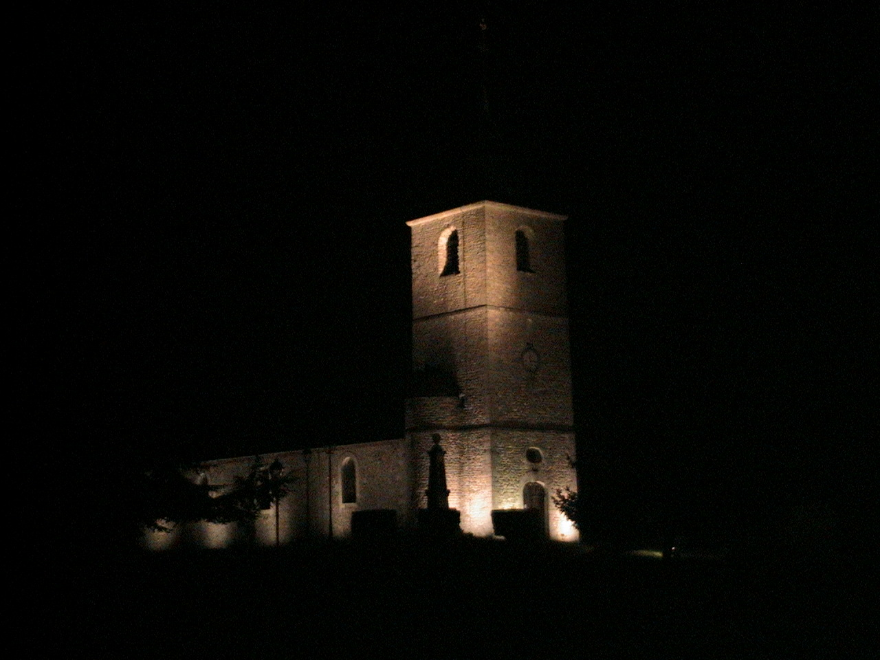 L'église de Douains (France, 27) de nuit. Auteur : Korbus (